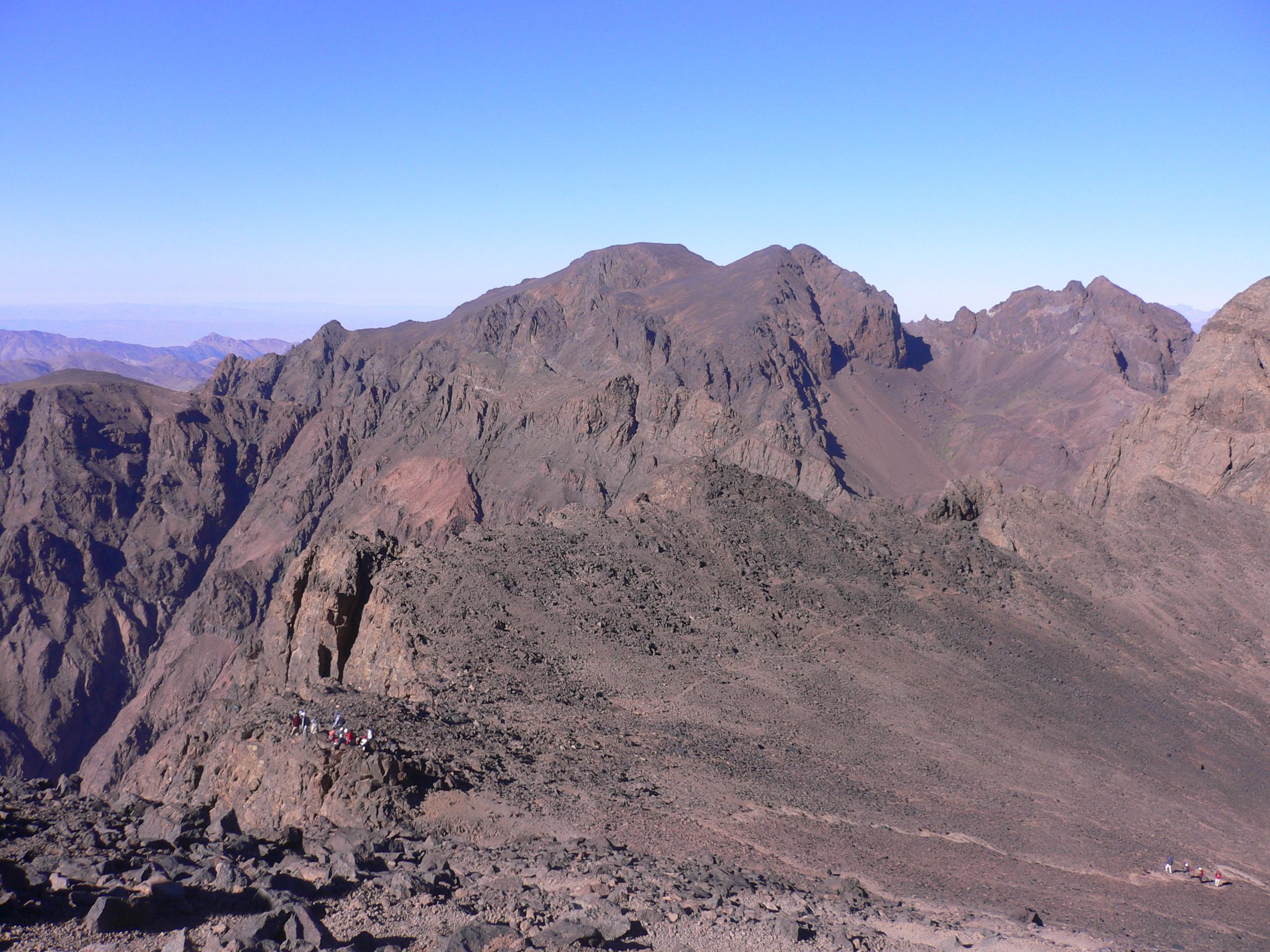 double sommet du Ouanoukrim depuis le Toubkal